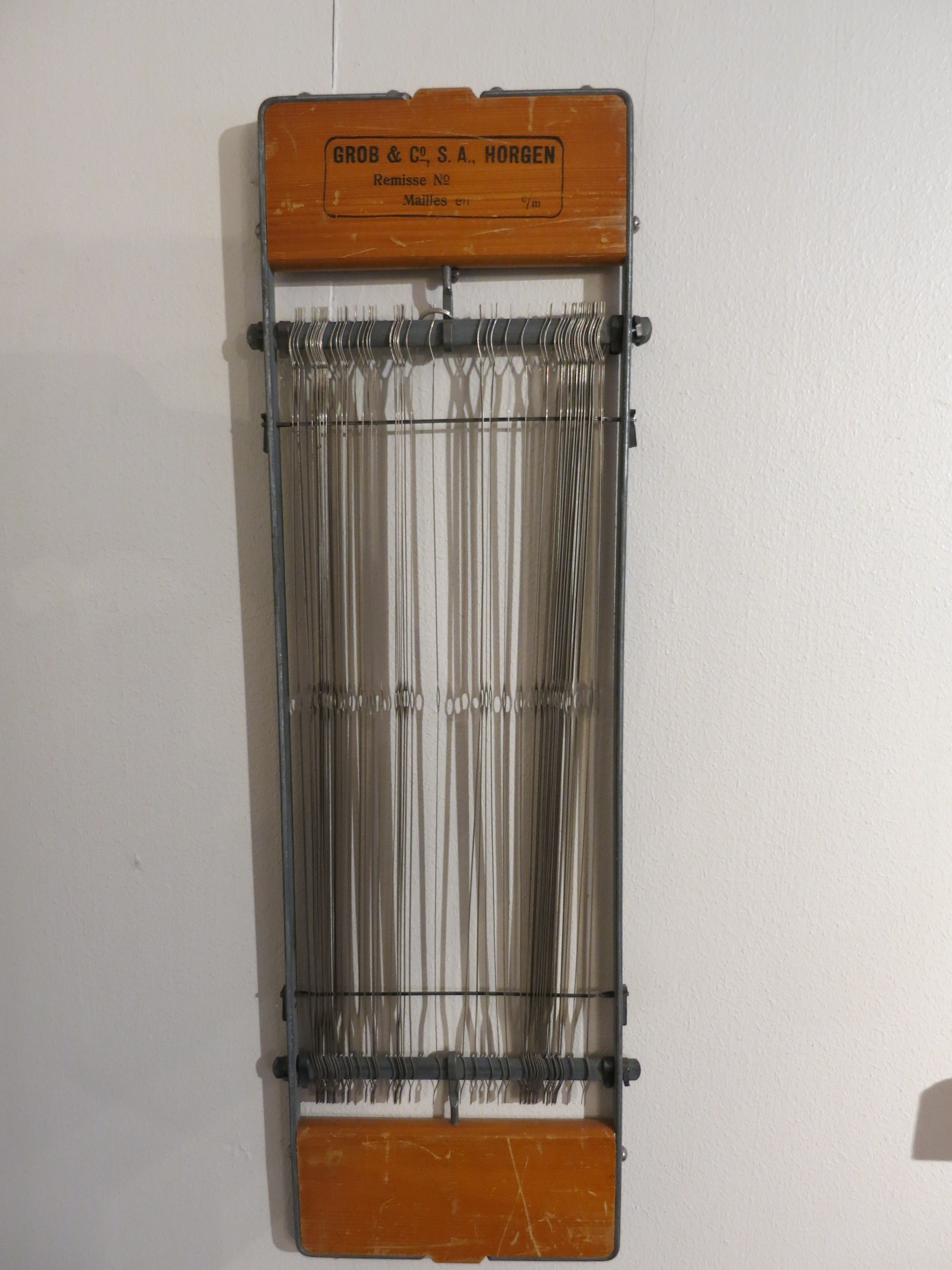 Grob Textile AG, Ortsmuseum Sust Horgen ZH, Schweiz